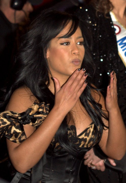 Amel Bent aux NRJ Music awards.